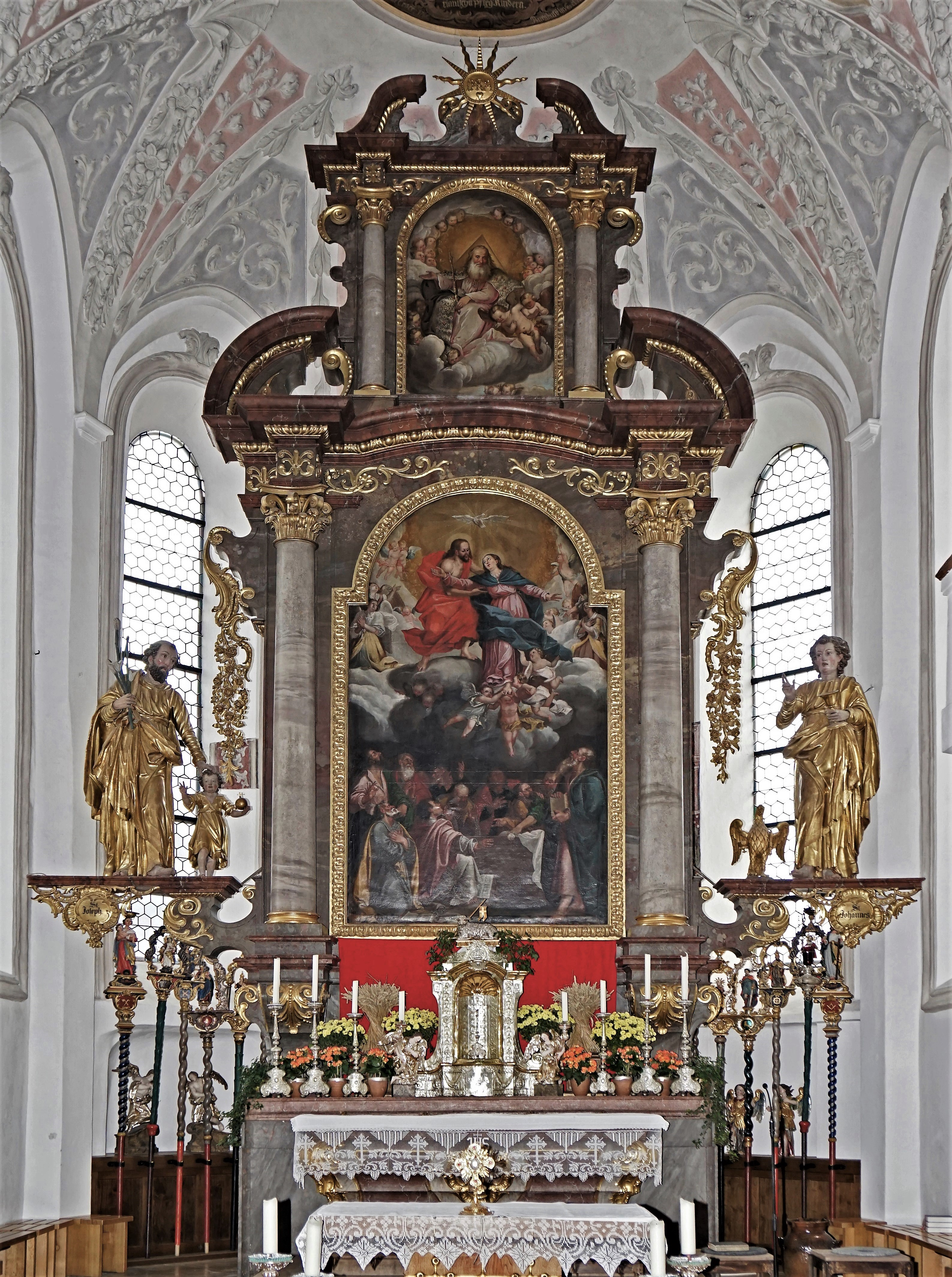 Pfarrkirche Mariä Himmelfahrt (Grassau), der barocke Hochaltar